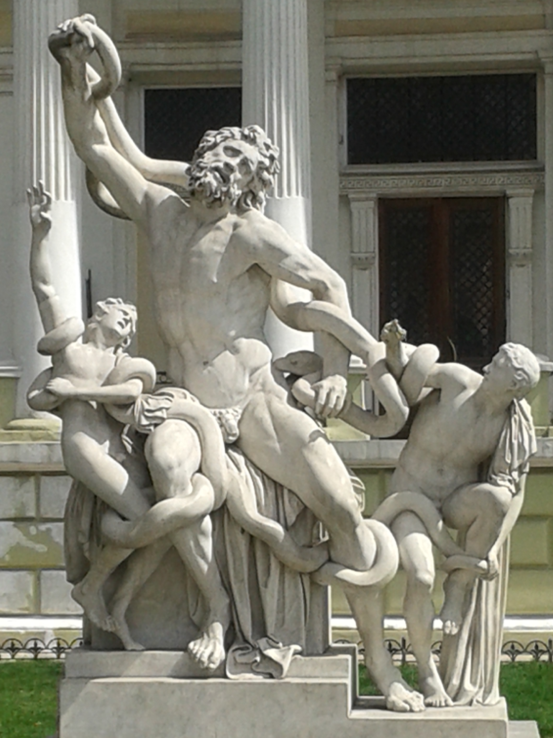 Скульптурна група “Лаокоон”, Одеса, Думська пл., 3